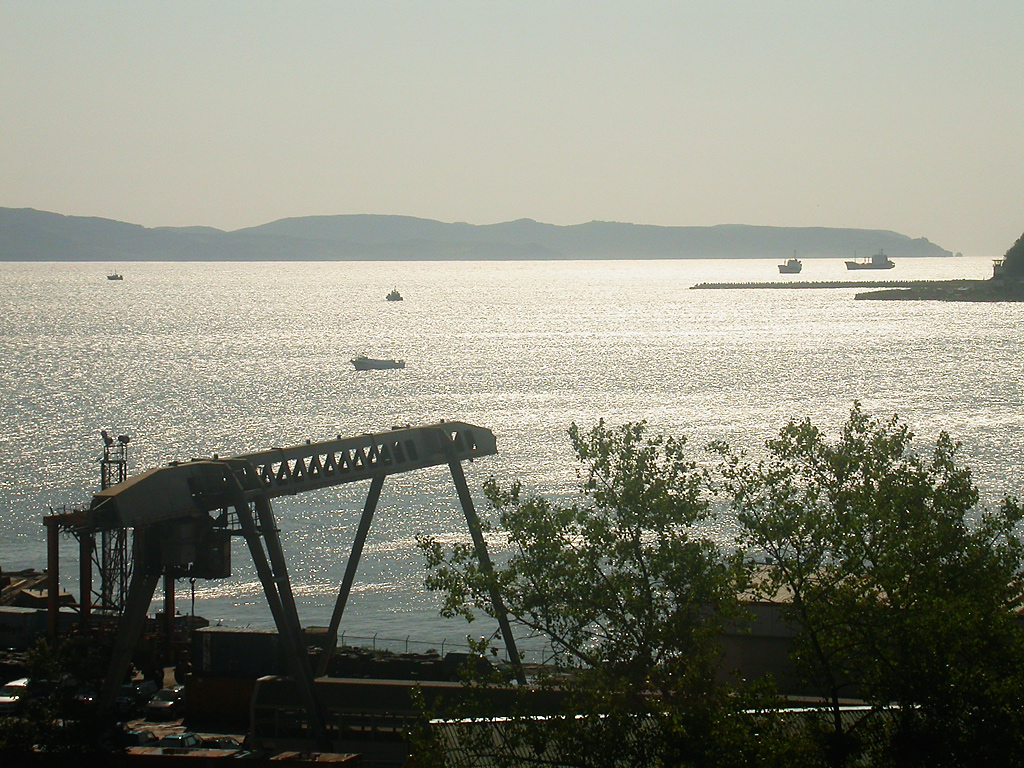 Nakhodka, Autumn, 2003